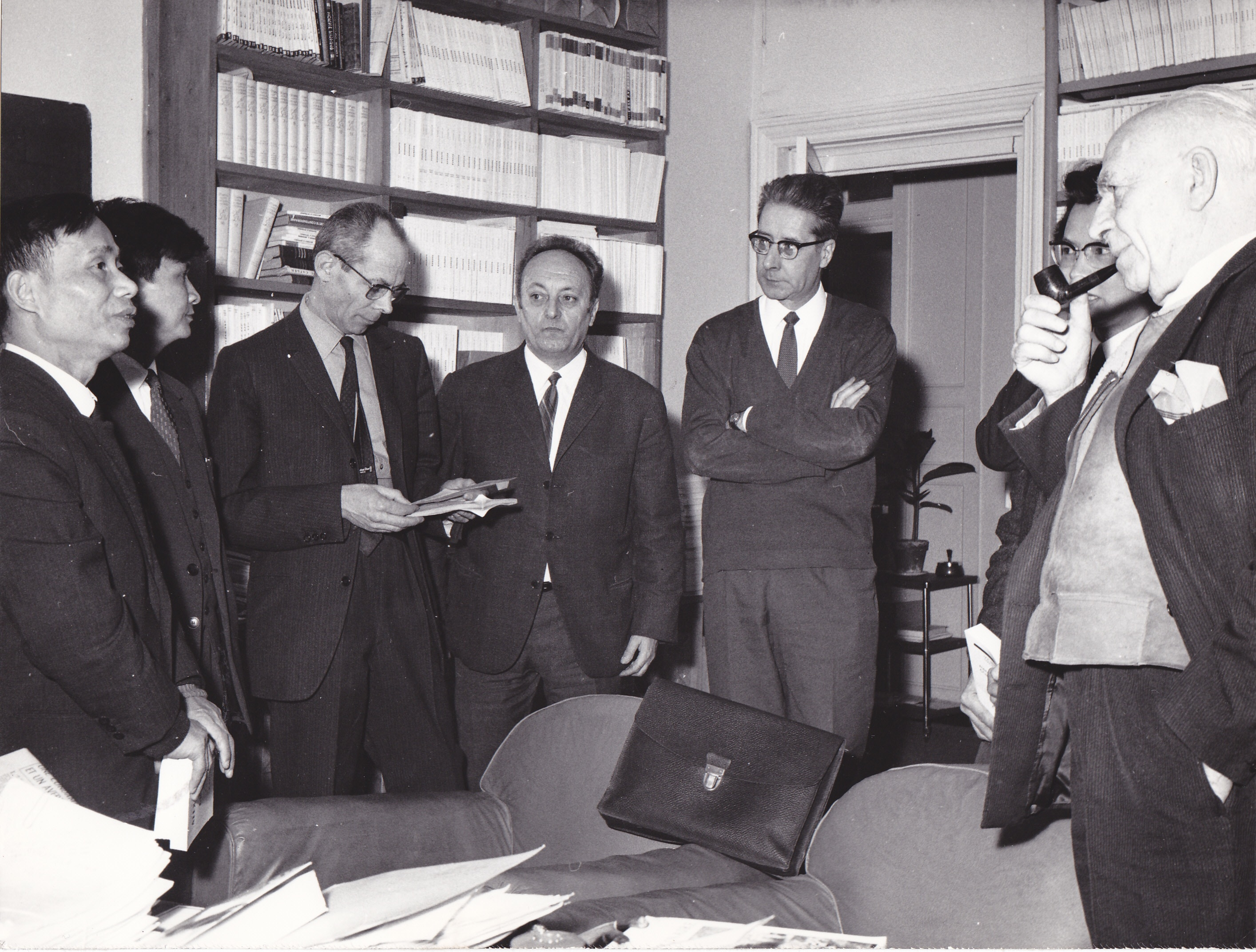 Dans les bureaux d'Europe, Paris, rue de Richelieu, 1966, délégation vietnamienne, de g. à d.: Jacques Gaucheron, Armand Monjou, Pierre Gamarra et Pierre Abraham